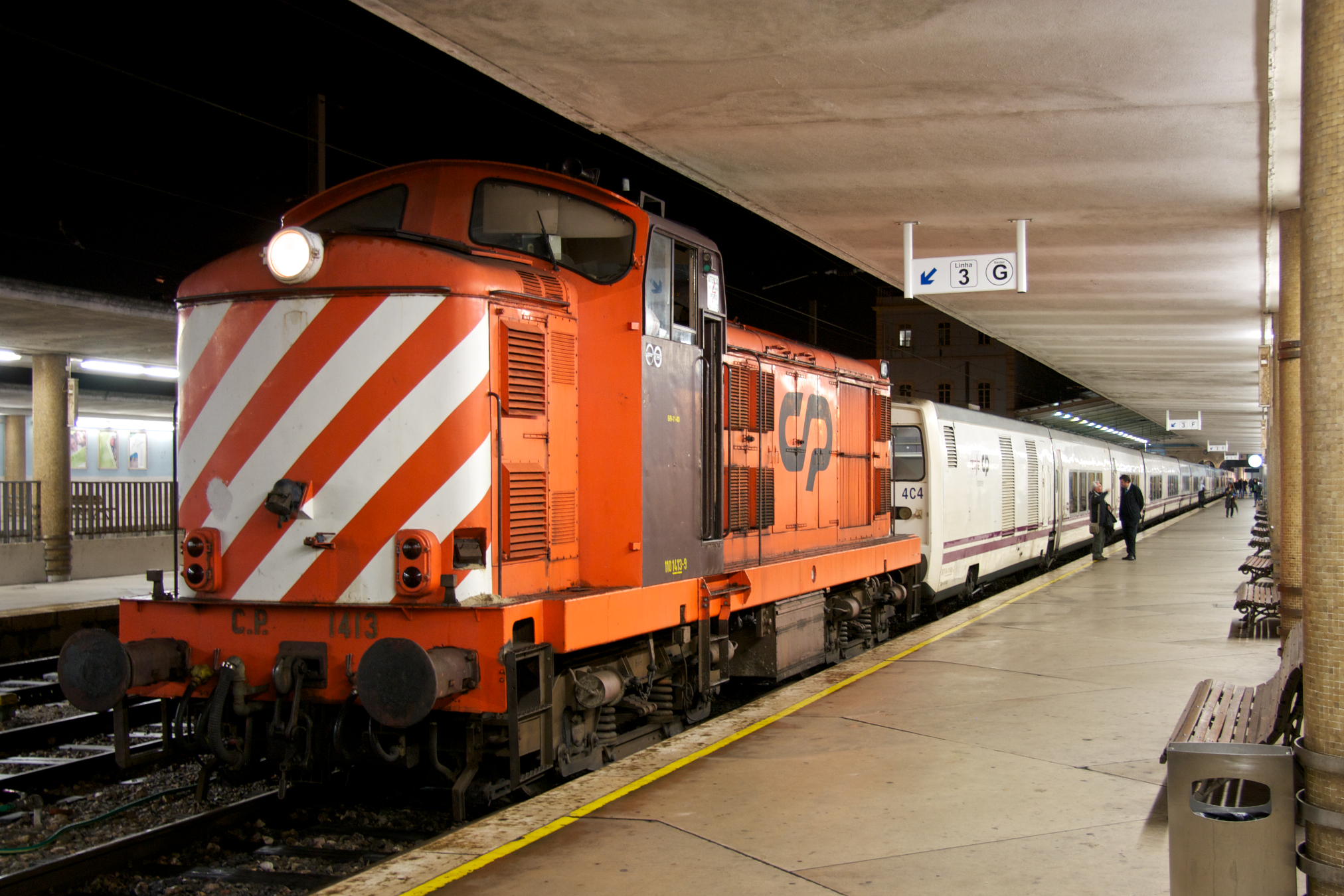 Tipo: Marcha 95601 (Comboio Internacional Sud Expresso 310 + Lusitânia Comboio Hotel 335) [Lisboa • Santa Apolónia - Coimbra–B] Local: Estação de Santa Apolónia [Linha do Norte, PK 0,0] Data e hora: 23 de Janeiro de 2013 [21h20] Material: Locomotiva 1413 + duas composições Talgo IV (14 carruagens e 4 furgões) esta fotografia foi publicada na plataforma Trainspo.